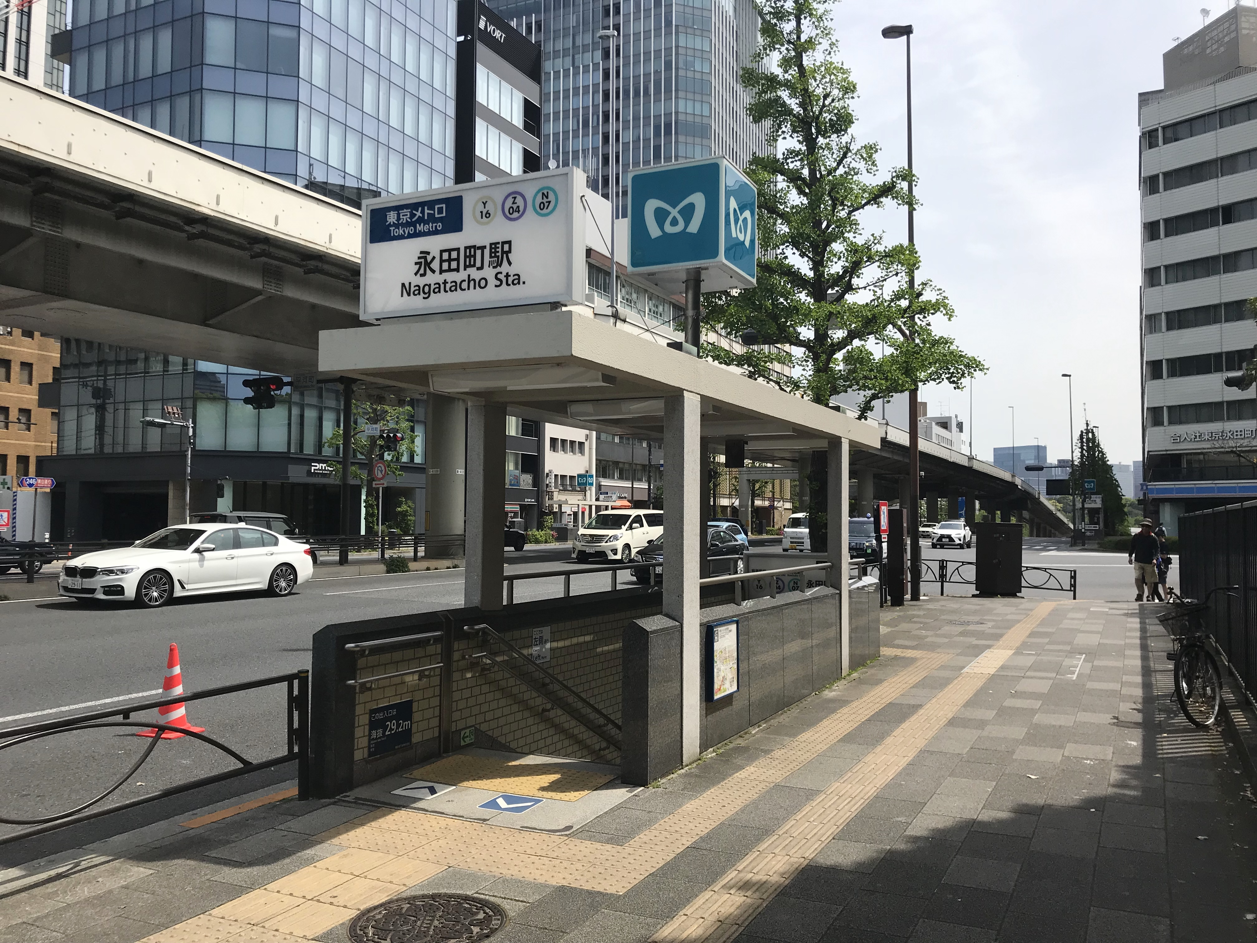 東京メトロ永田町駅6番出入口